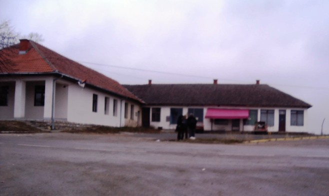 Средиште Слатине.